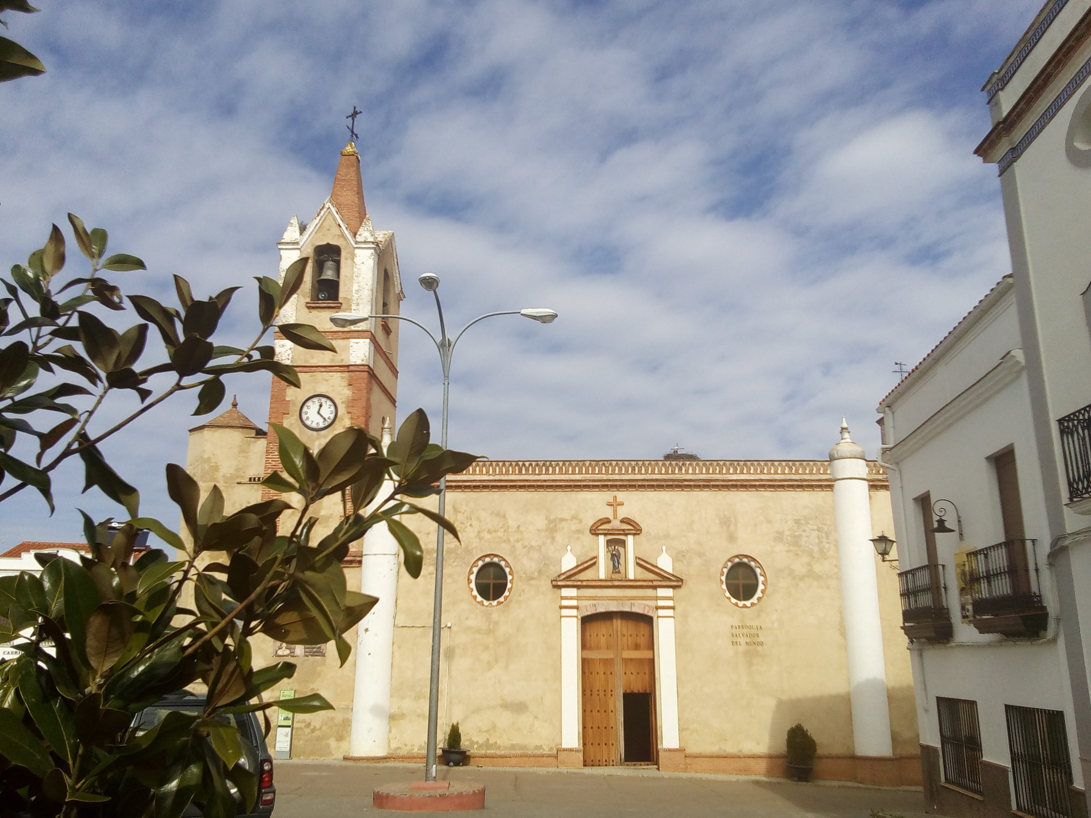 Iglesia Parroquial Salvador del Mundo2 (2)